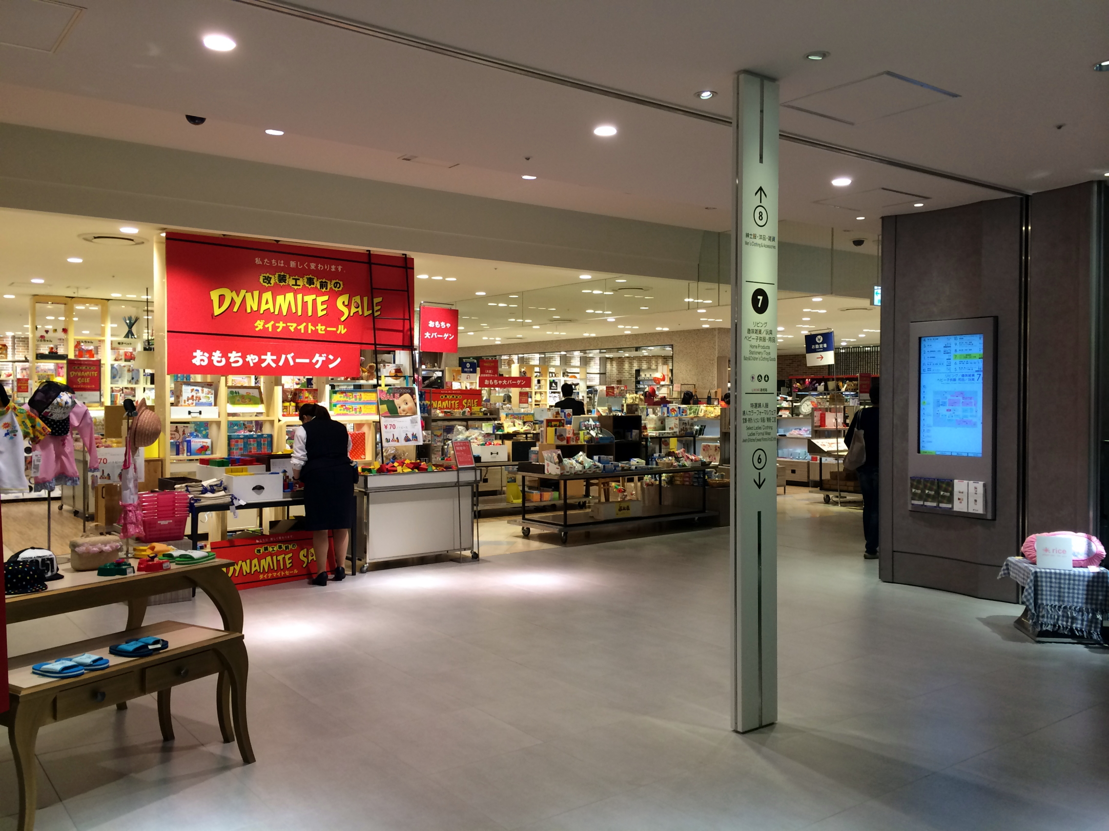 JR Osaka Station ISETAN Level 7